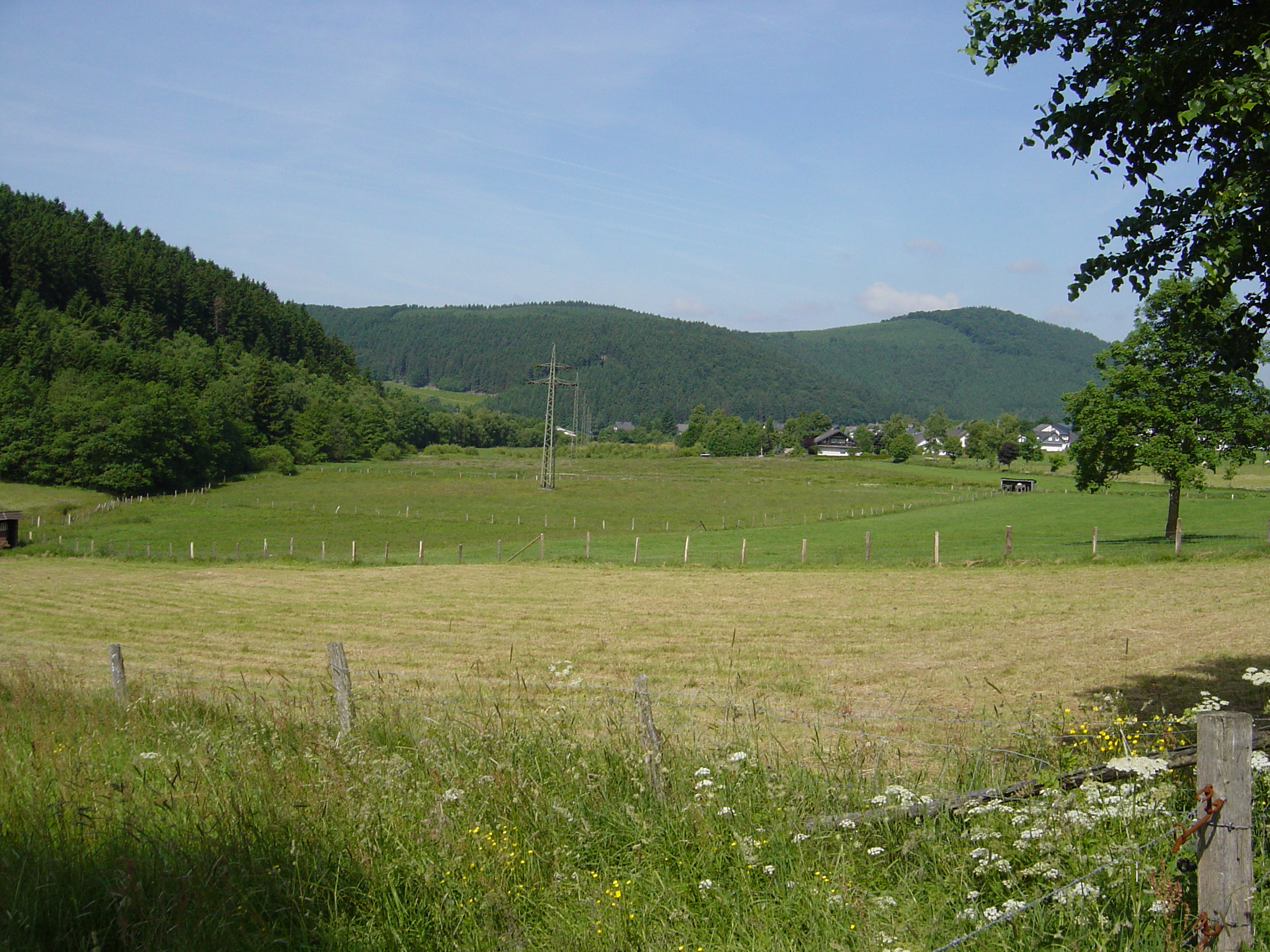 Westteil vom Naturschutzgebiet Hillenbachtal (Grünland im Bild) im Eigentum der NRW-Stiftung. Im Hintergrund Hildfeld. Wald gehört zum LSG Winterberg.